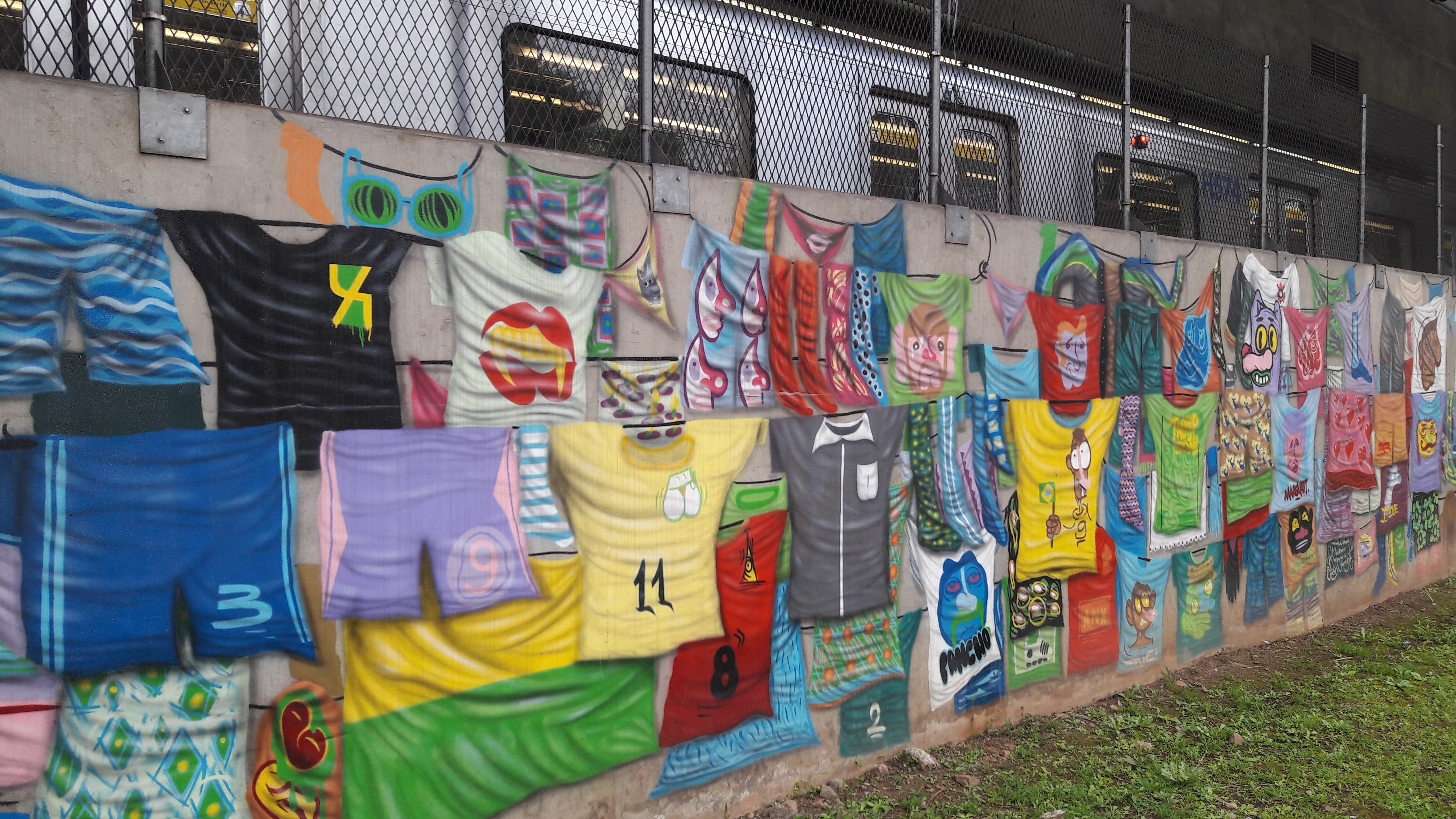 Vista do muro grafitado pelo projeto 4KM, em São Paulo (city), Brasil.